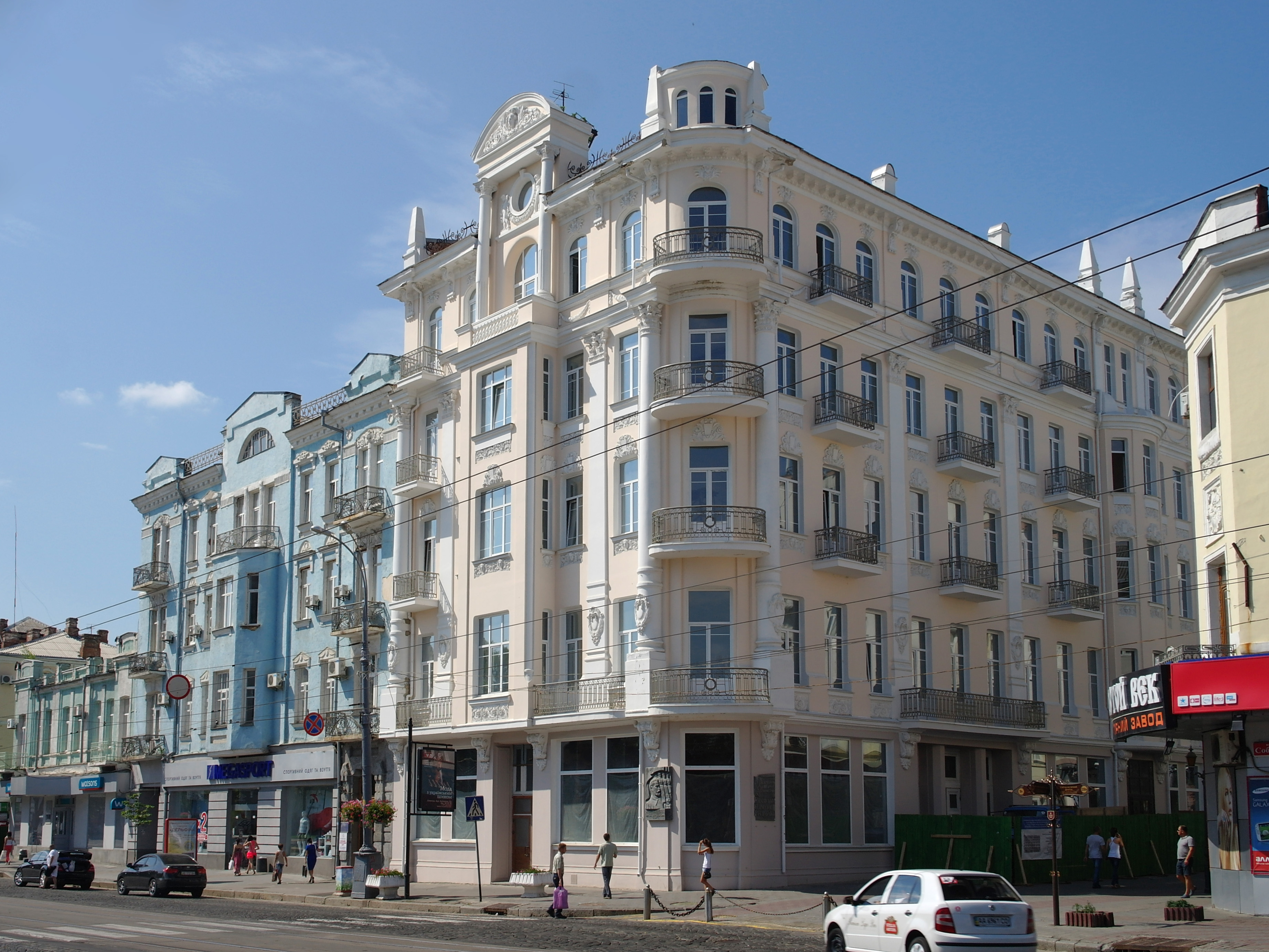 Вінниця, Козицького, 36 Готель «Савой»